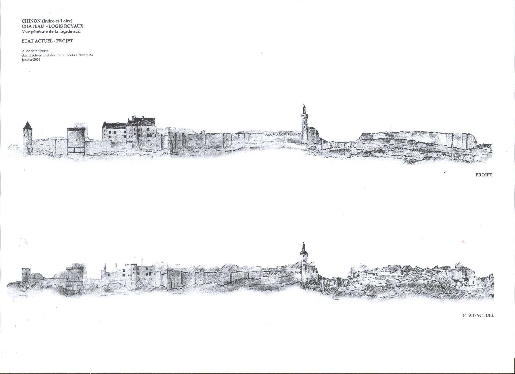 Cette aquarelle correspond au projet de restauration de la forteresse royale de Chinon - on distingue très bien sur cette aquarelle les éléments-clefs de cette restauration : le reconstruction du logis royal ainsi que du rempart sud du fort Saint-Georges ; l'objectif principal étant de redonner à la forteresse sa silhouette imposante.